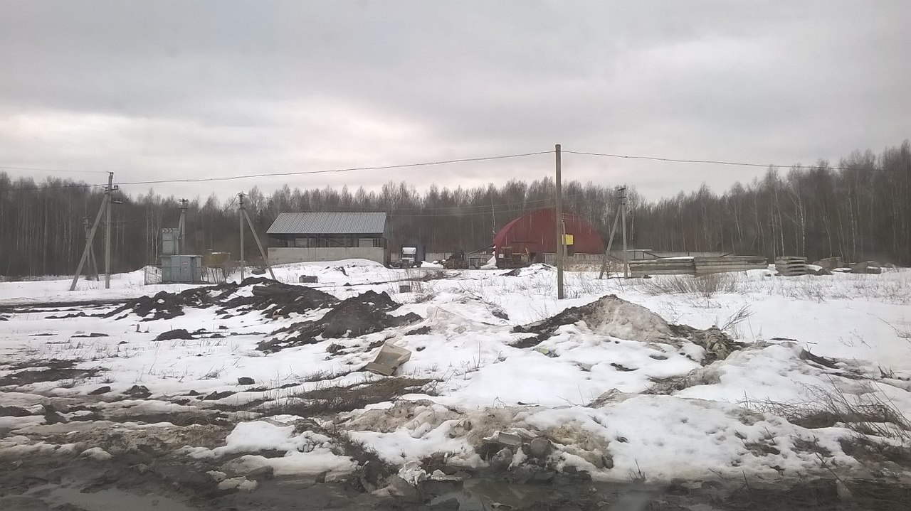 Мусороперерабатывающий завод , по Голландской системе.